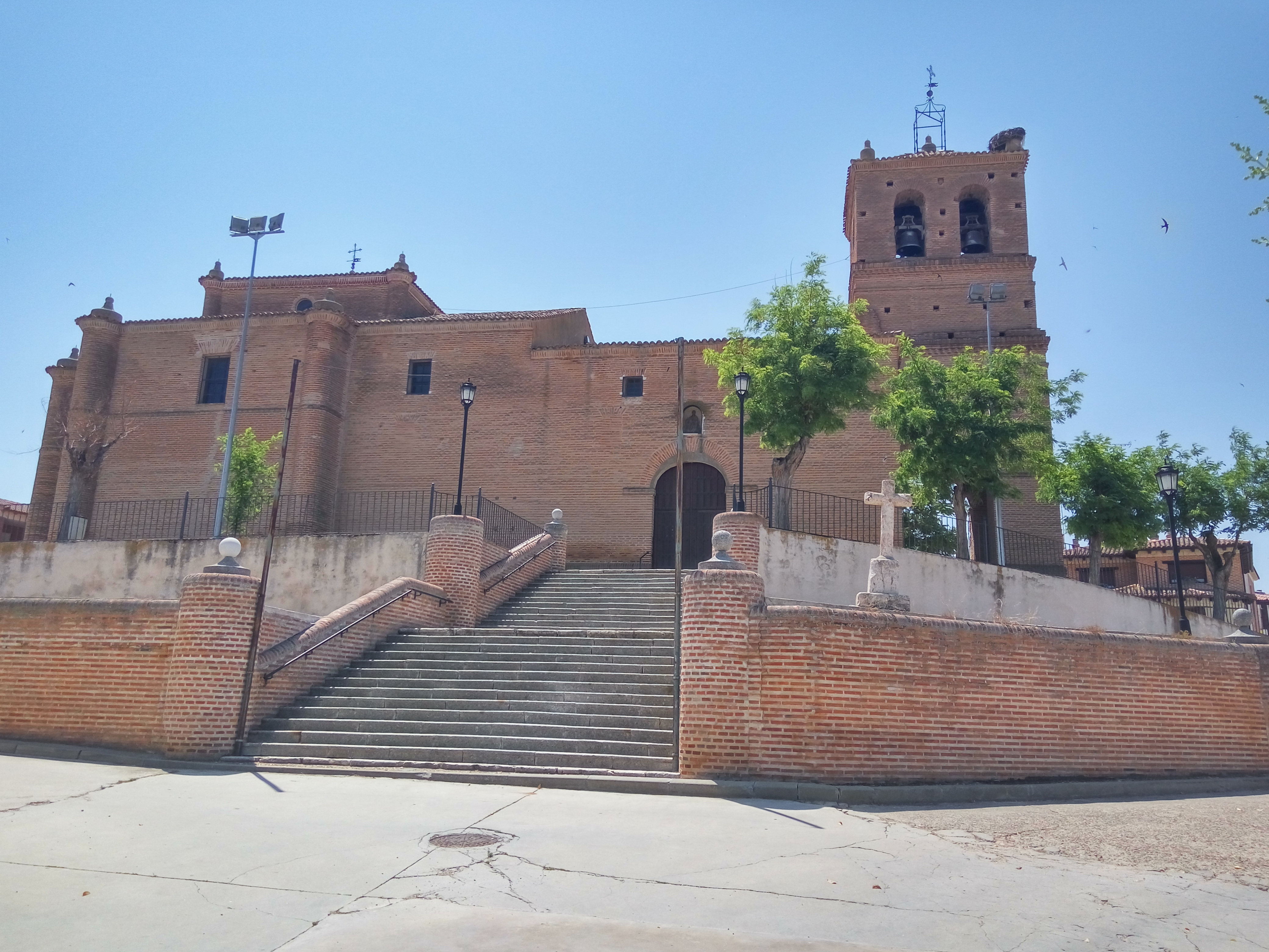 Iglesia de San Nicolas de Bari en Pollos, Valladolid